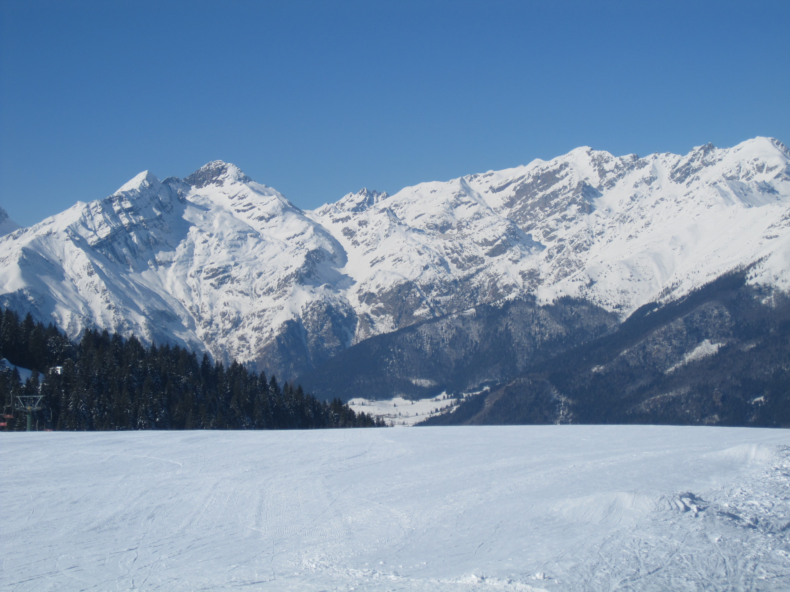 parco regionale delle Orobie Bergamasche (Q3895555)